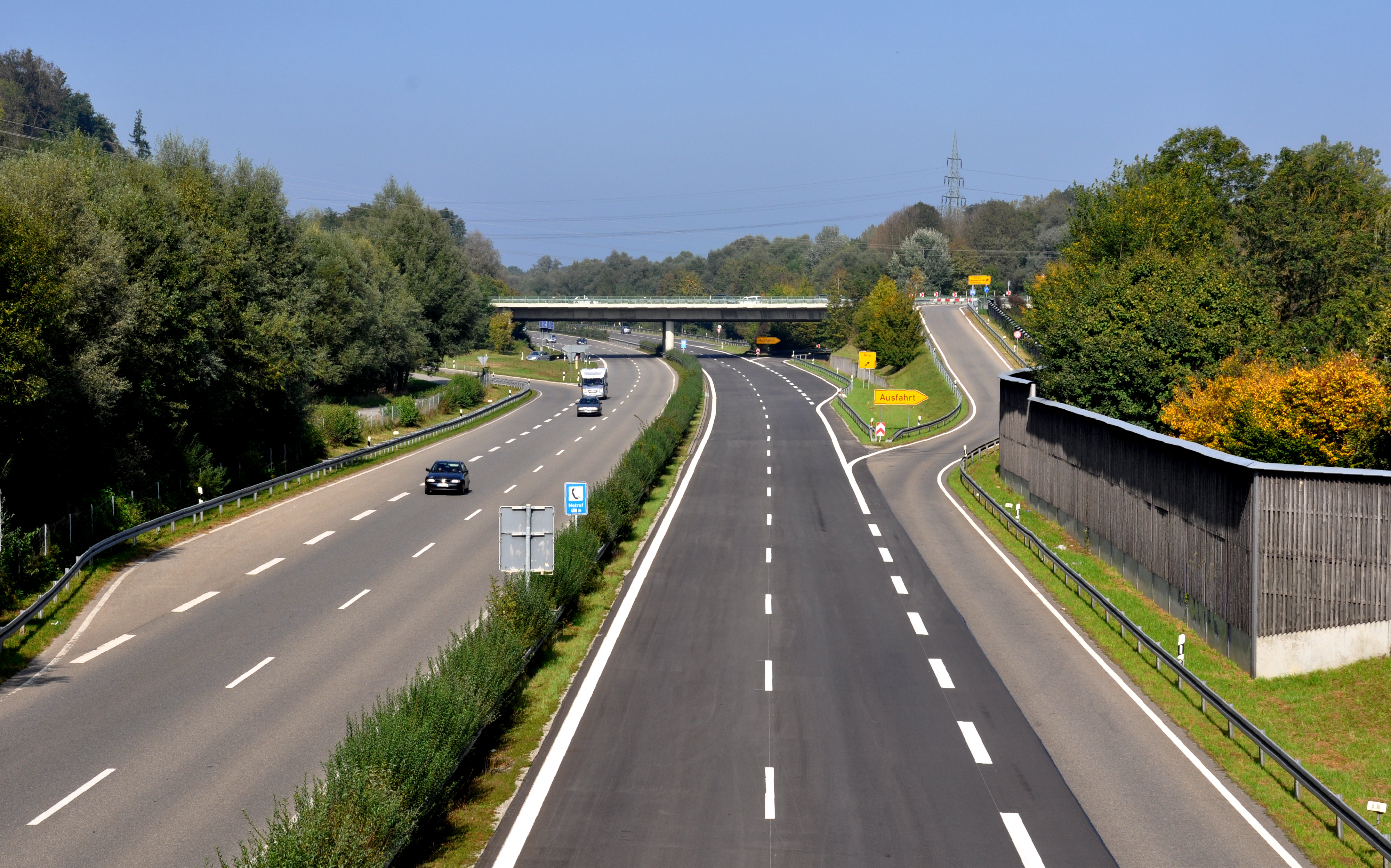 B 30 neu, Ausfahrt Ravensburg-Nord und Berg, Blick von der Brücke Brühlstraße nach Norden